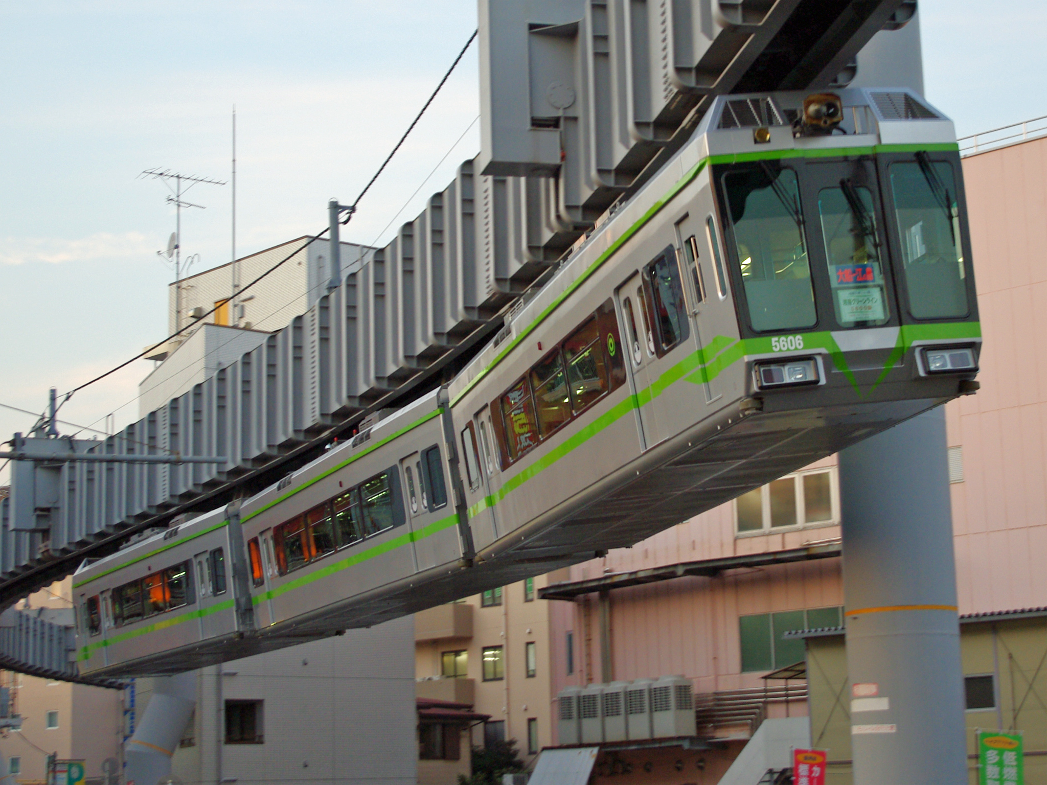 5000系第3編成外観。大船～富士見町間にて撮影。